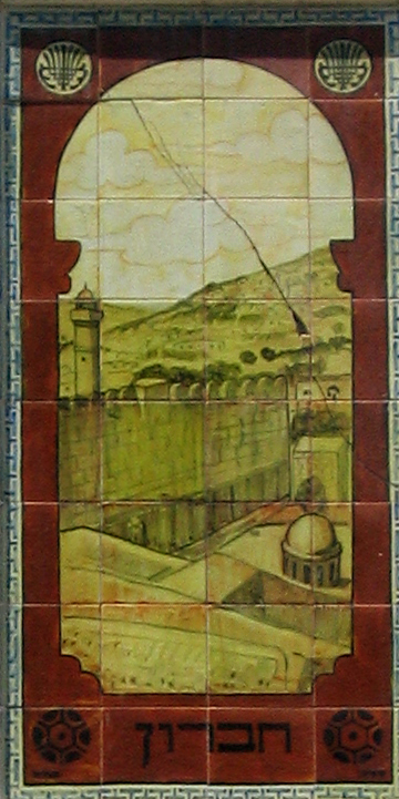 school in Ehad Haam street, Tel Aviv-Yaffo